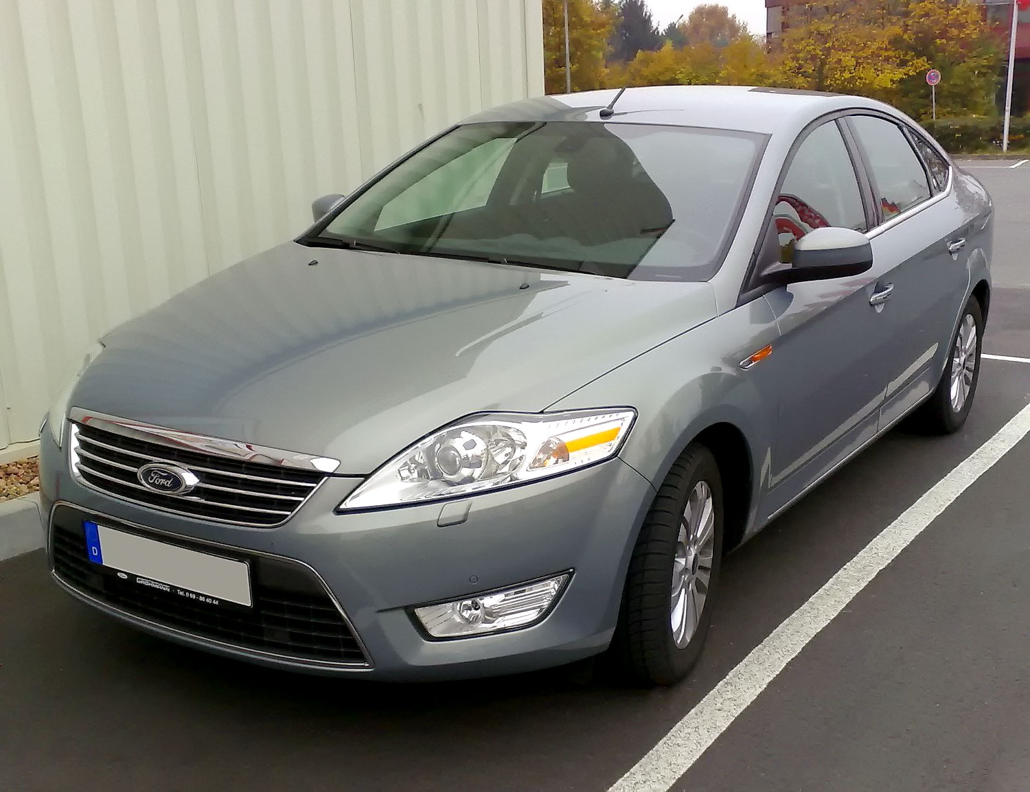 Ford Mondeo 3rd generation